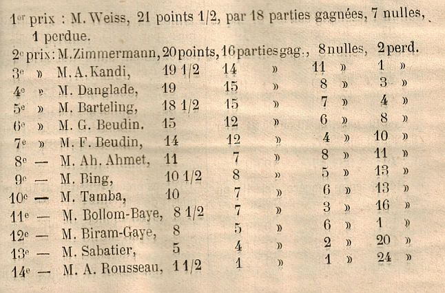 Таблица шашечного турнира 1895 года в Париже